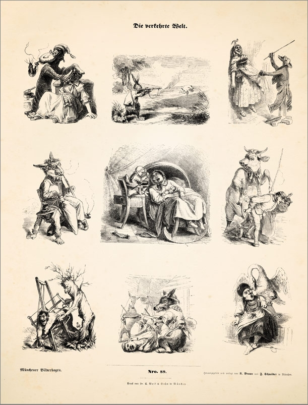 Münchener Bilderbogen-Nr. 89 aus dem Jahr 1851. München: Braun & Schneider.